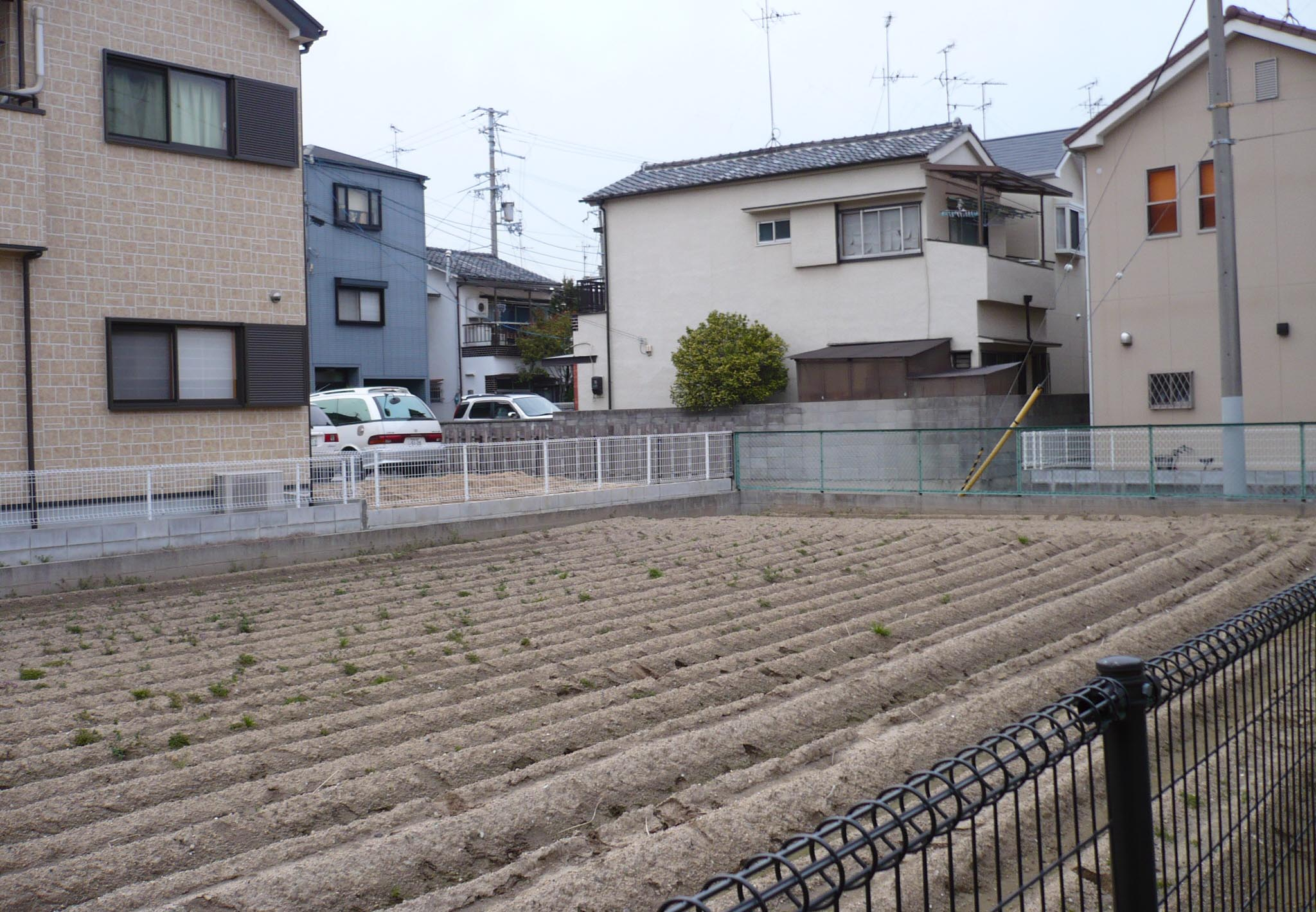 深井城の推定地